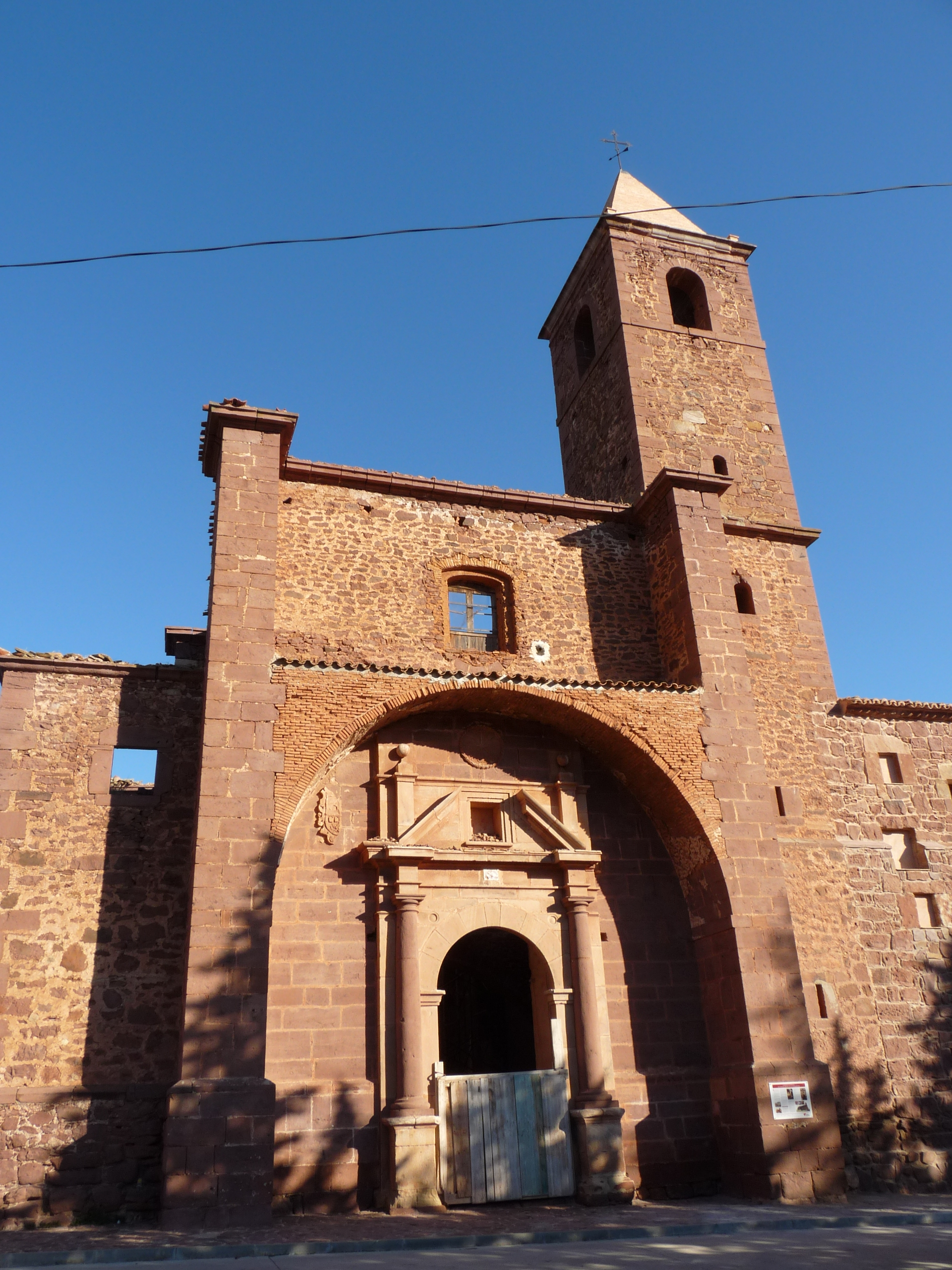 Gotor - Convento de Nuestra Señora de la Consolación s.XVI - Fachada iglesia